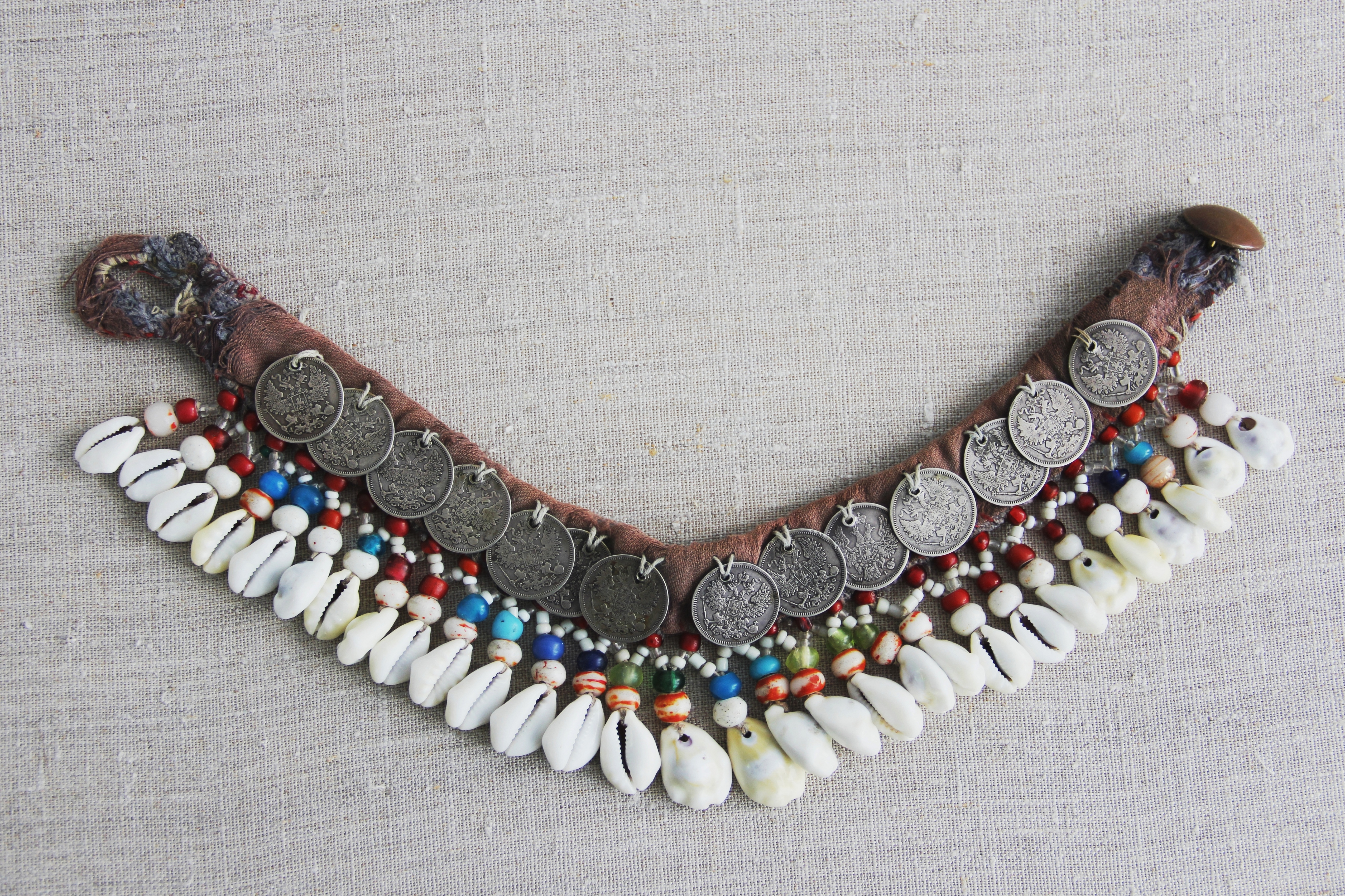 Традиционное шейное девичье украшение. XIX век. Раковины каури, бусы, монеты. Низовая этнографическая группа (анатри). Подлесная подгруппа. Частная коллекция